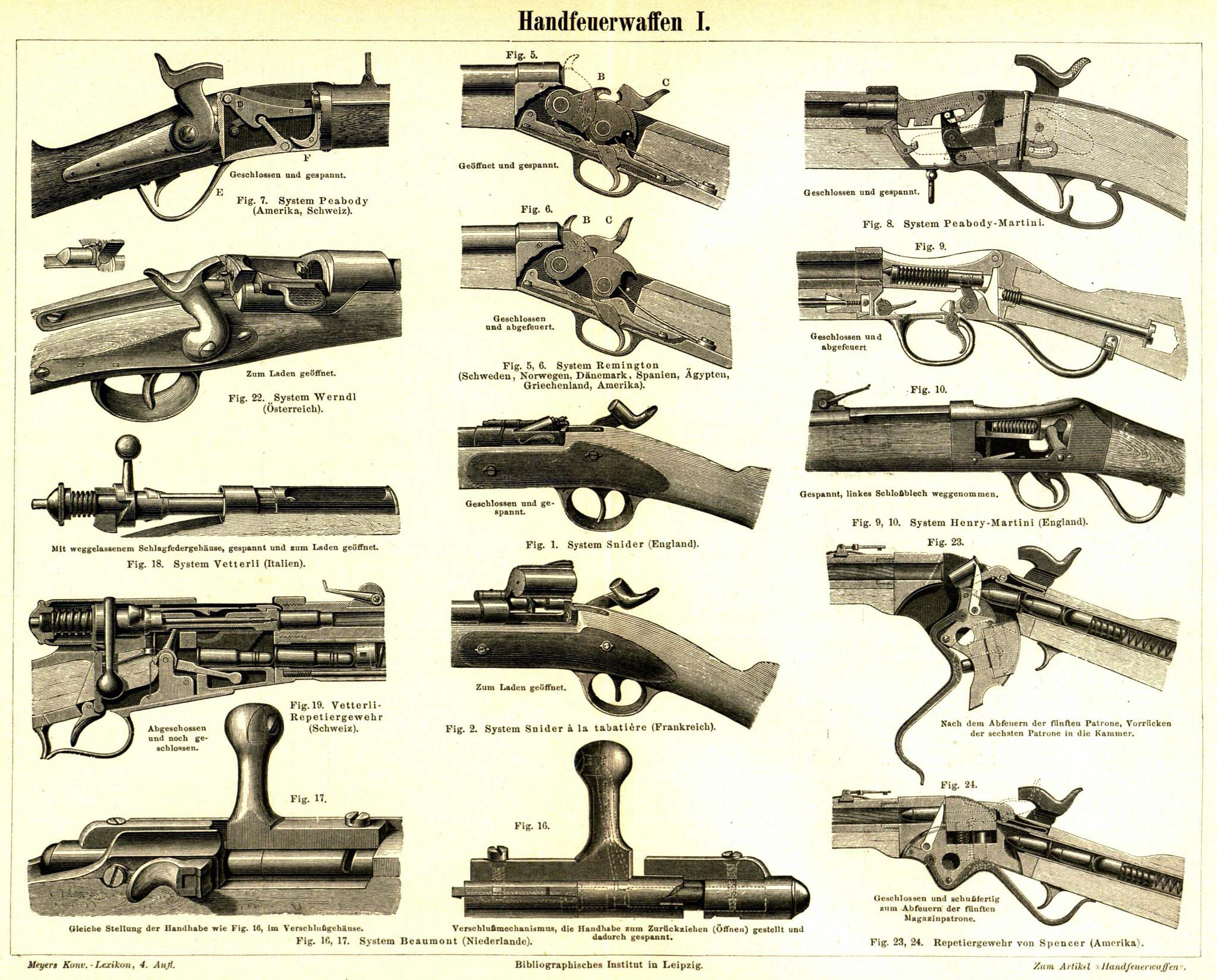 Tafel „Handfeuerwaffen I“